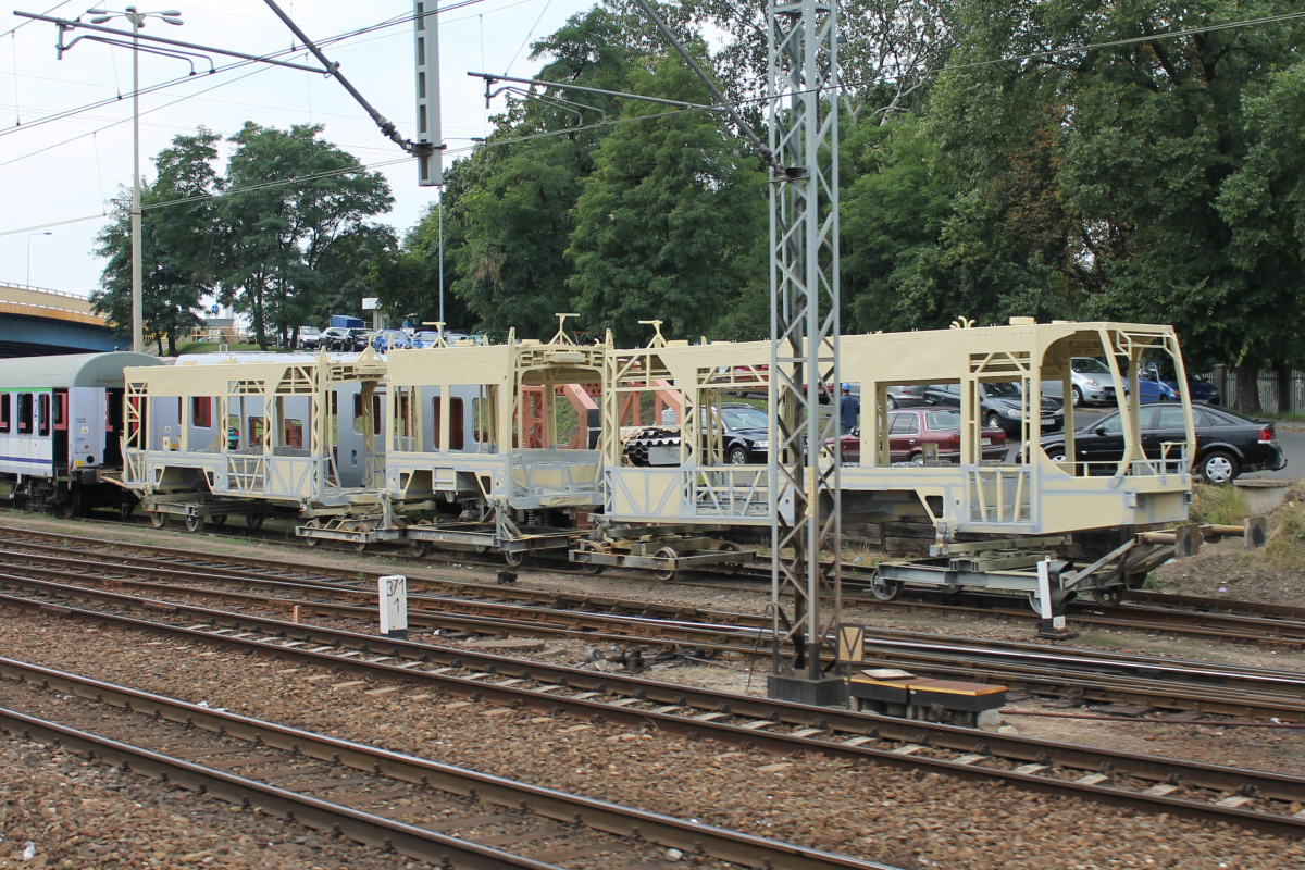 Pudła tramwaju Pesa Fokstrot dla Moskwy na terenie bocznicy zakładu Pesa Bydgoszcz. This photo was taken during Railway Wikiexpedition 2014 set up by Wikimedia Polska Association in cooperation with Fundacja Grupy PKP. You can see all photographs in category Wikiekspedycja kolejowa 2014.